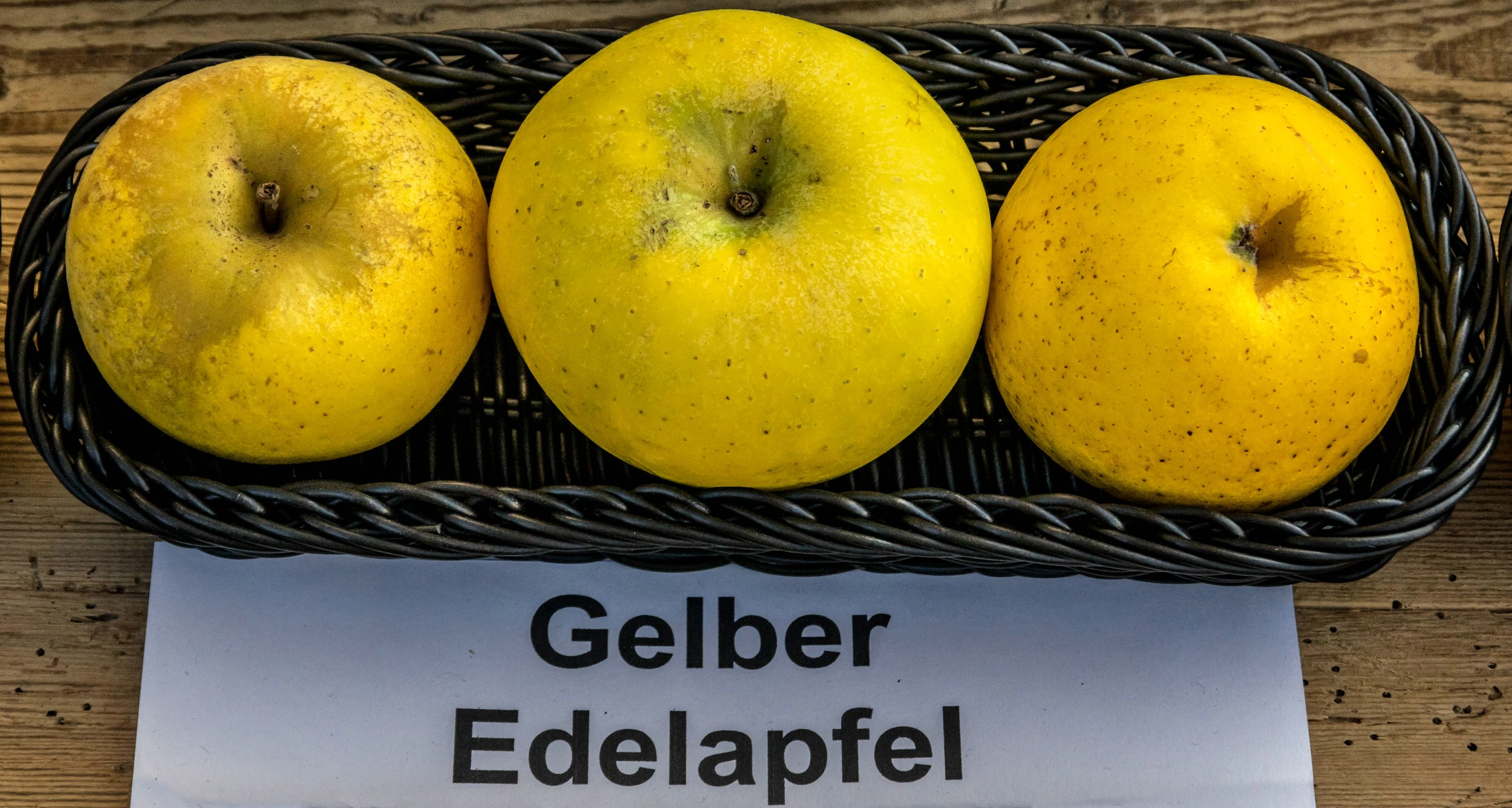 Alte Apfelsorten, von denen es im Badischen noch tragende Bäume gibt. Alle Aufnahmen au dem Oktober 2015